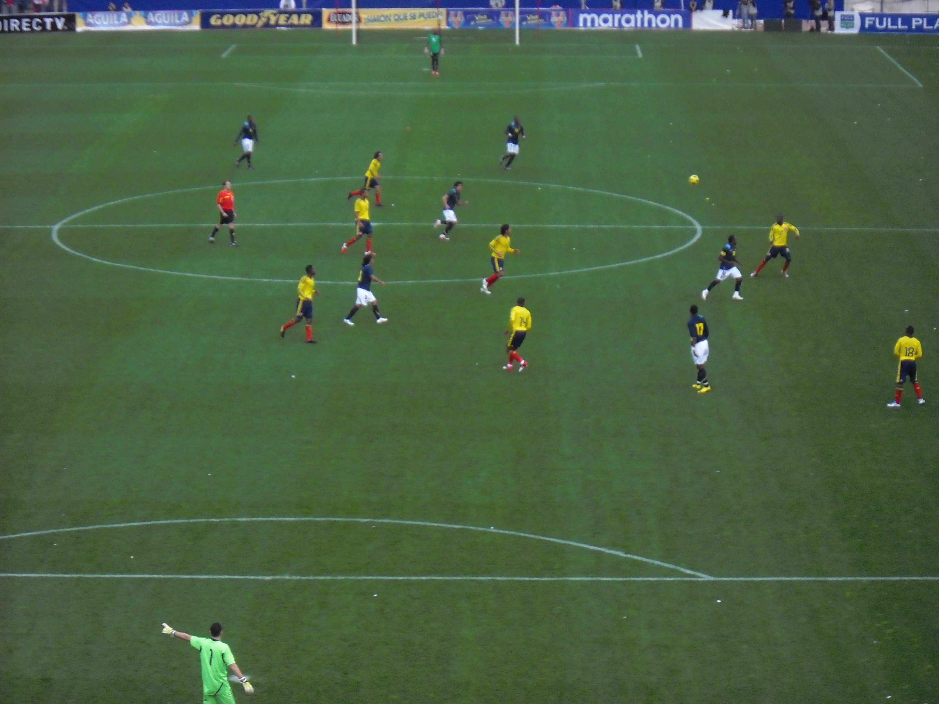 Captura del partido Colombia-Ecuador que tuvo lugar el dia 26/3/11 en Madrid.